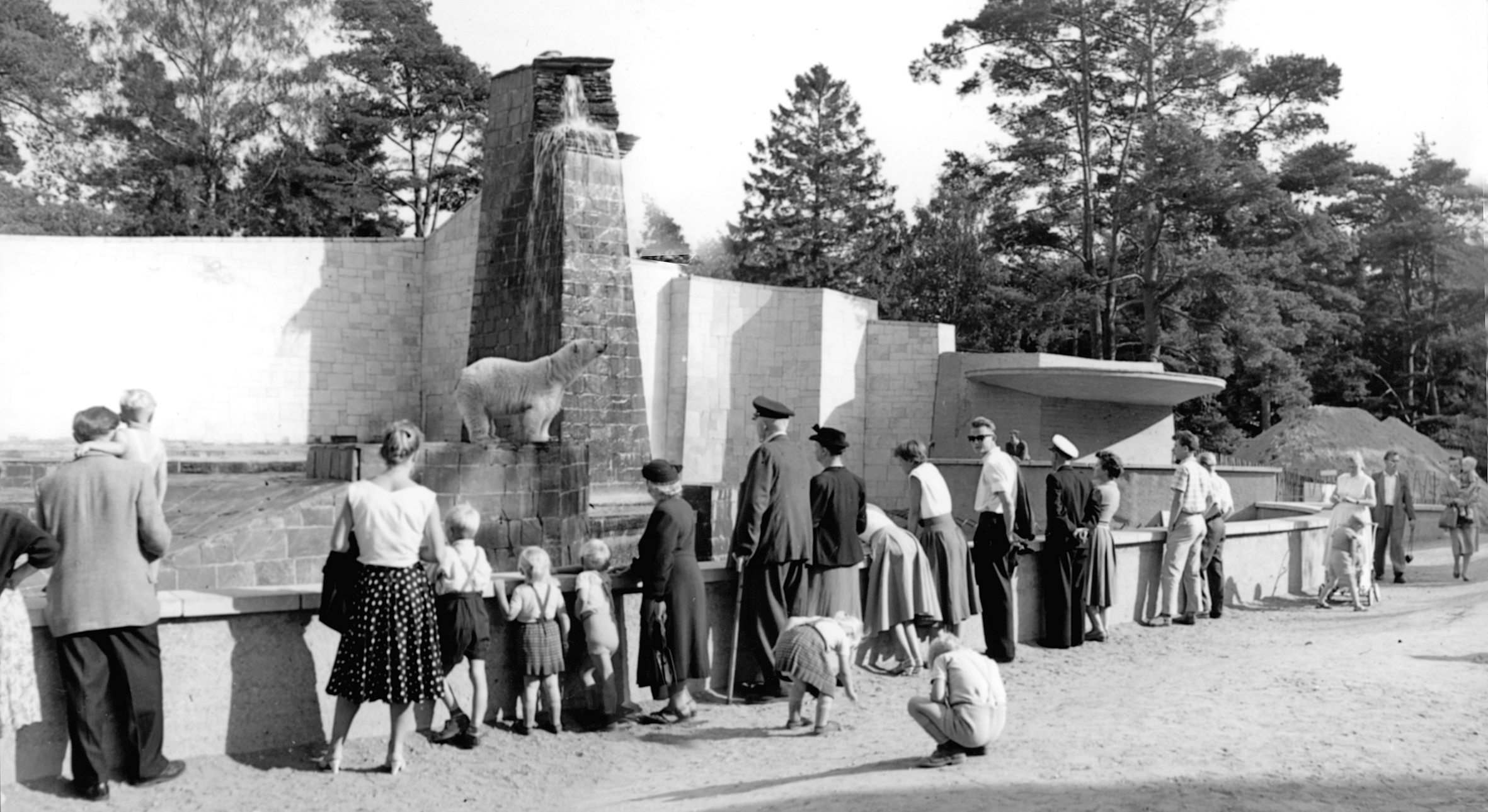 Große Eisbärenanlage und Teil der Bärenburg im Rostocker Zoo